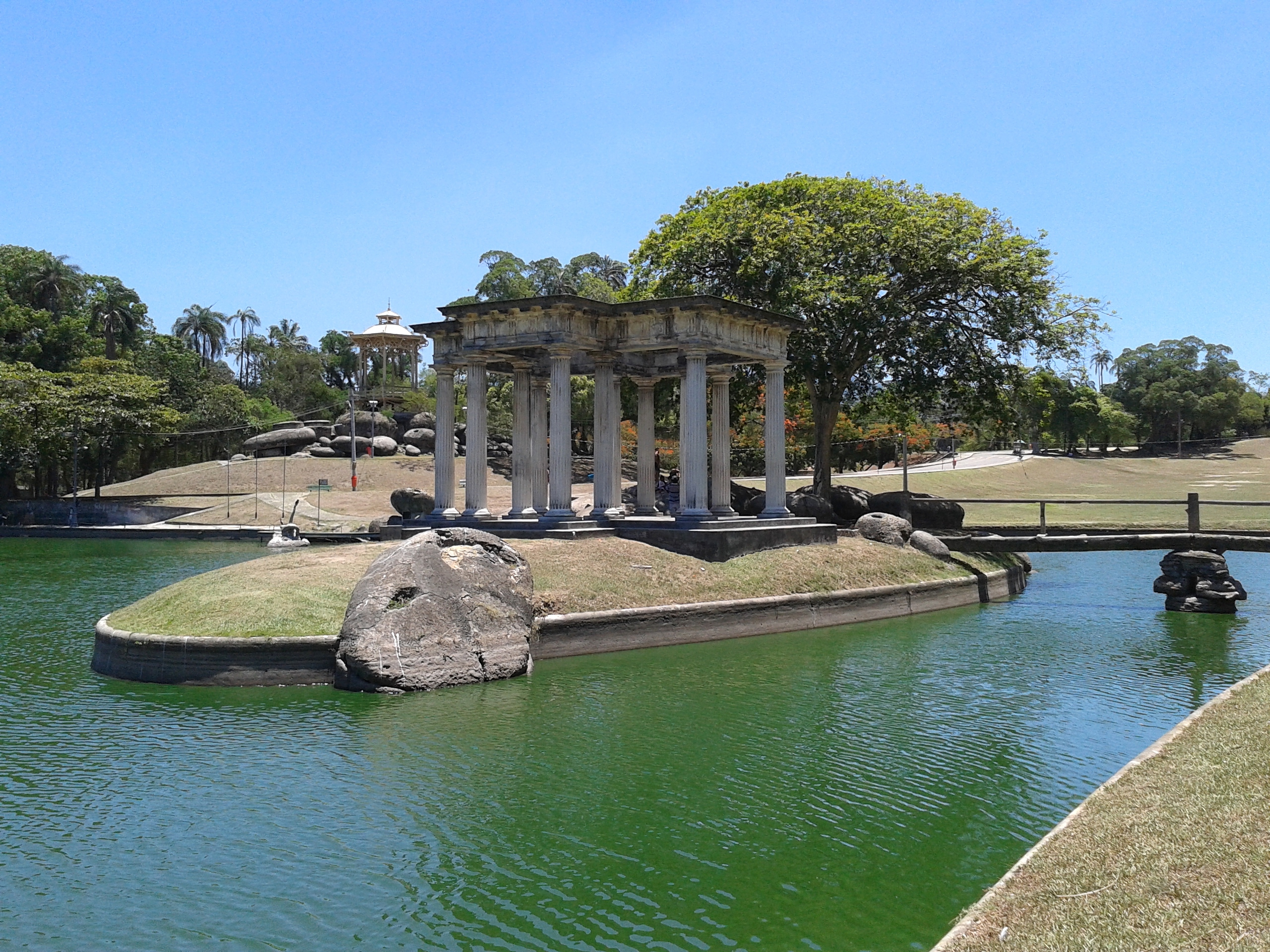 Templo de Apolo e Pagode Chinês, na Quinta da Boa Vista, Rio de Janeiro, Brasil.